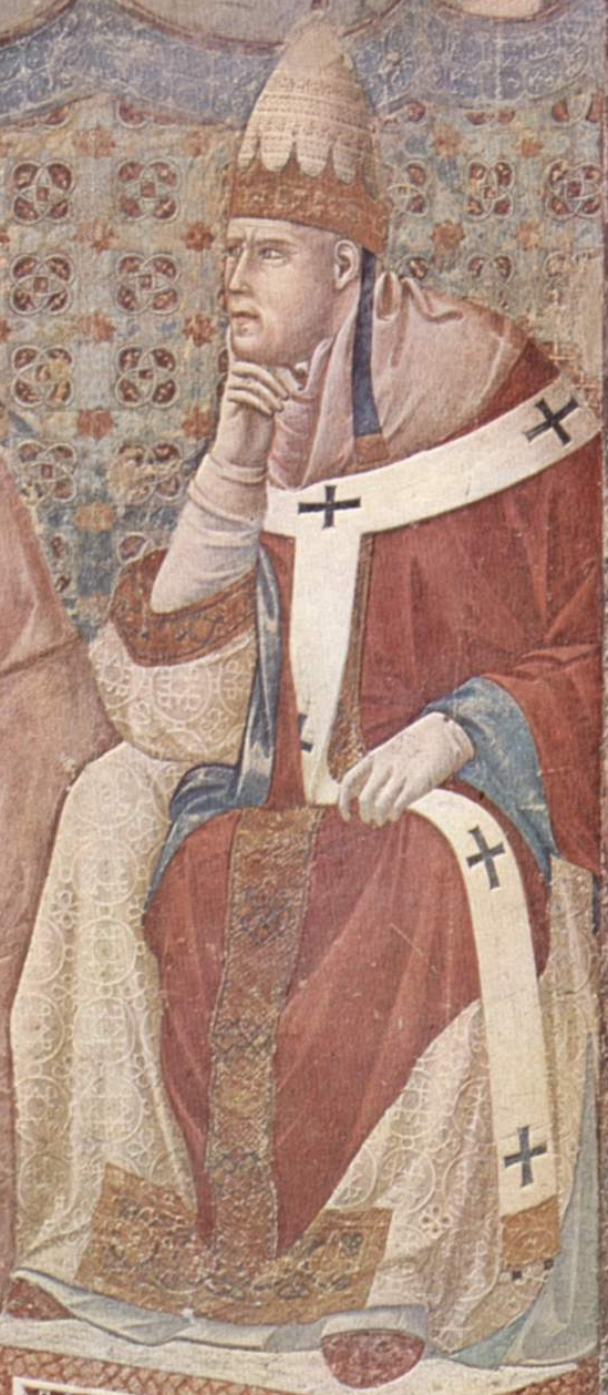 Freskenzyklus zum Leben des Hl. Franziskus von Assisi, Szene: Die Predigt das Hl. Franziskus vor Papst Honorius III.